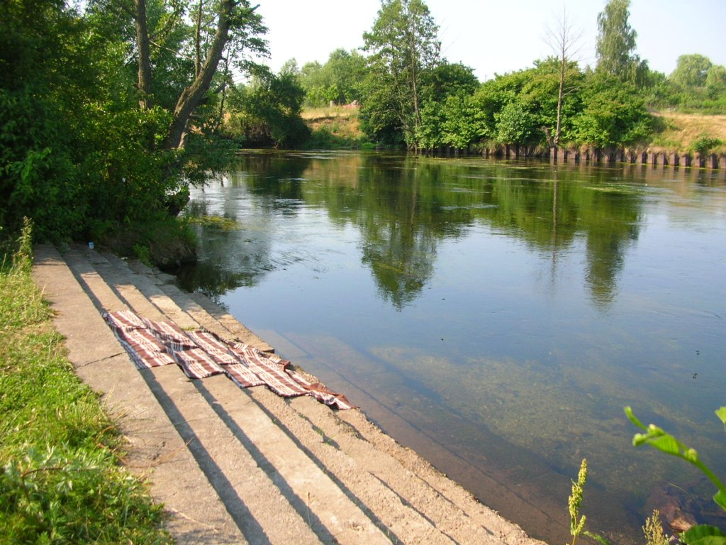 Brda w Bydgoszczy - Jachcice